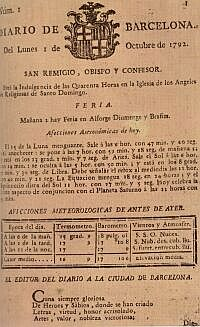 Première couverture du Diario de Barcelona (01/10/1792)